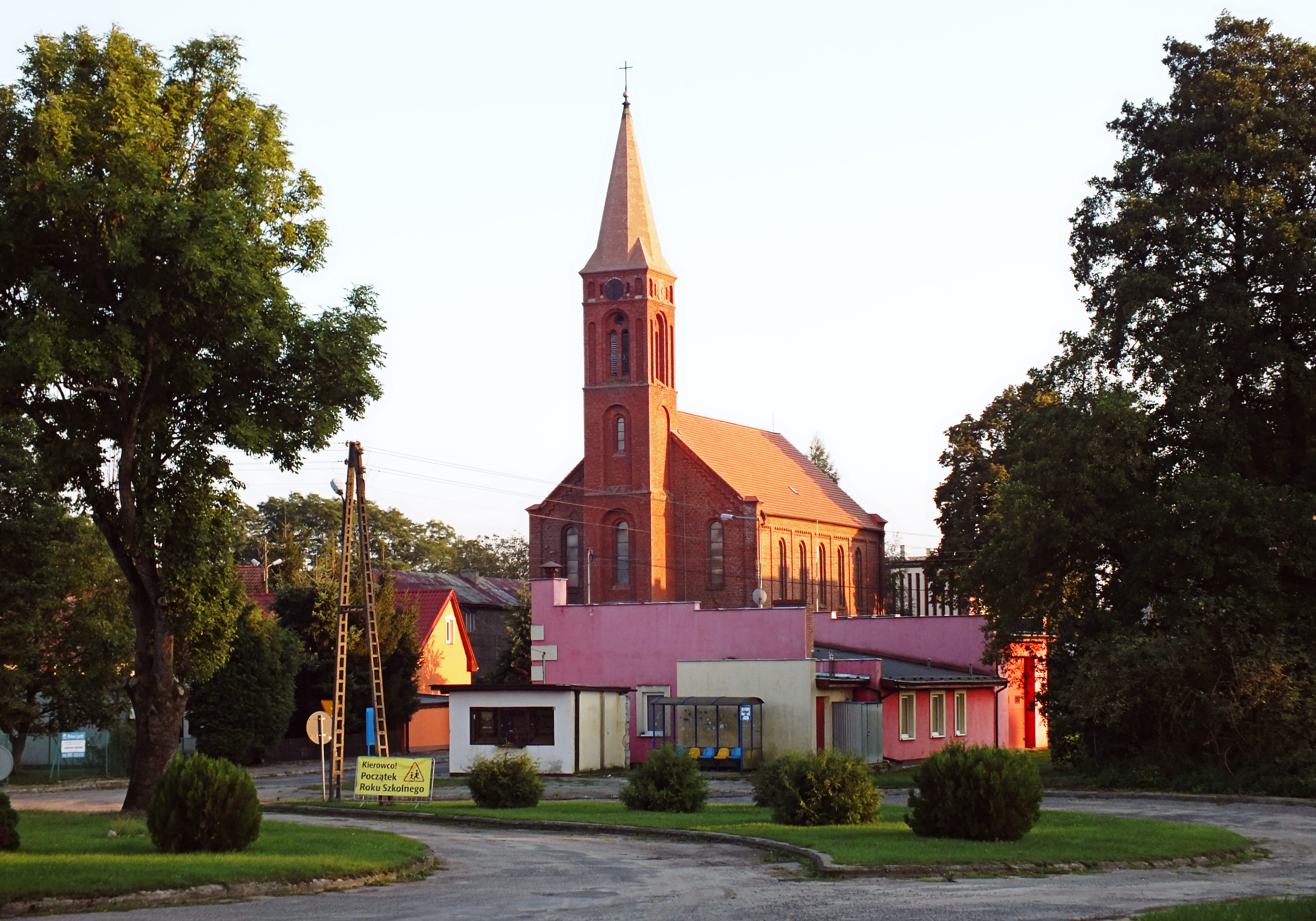 Kąkolewo, widok centrum wsi.